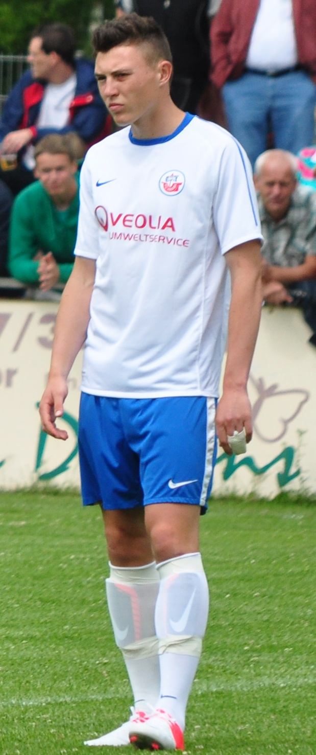 Niols Quaschner im Trikot Hansa Rostocks